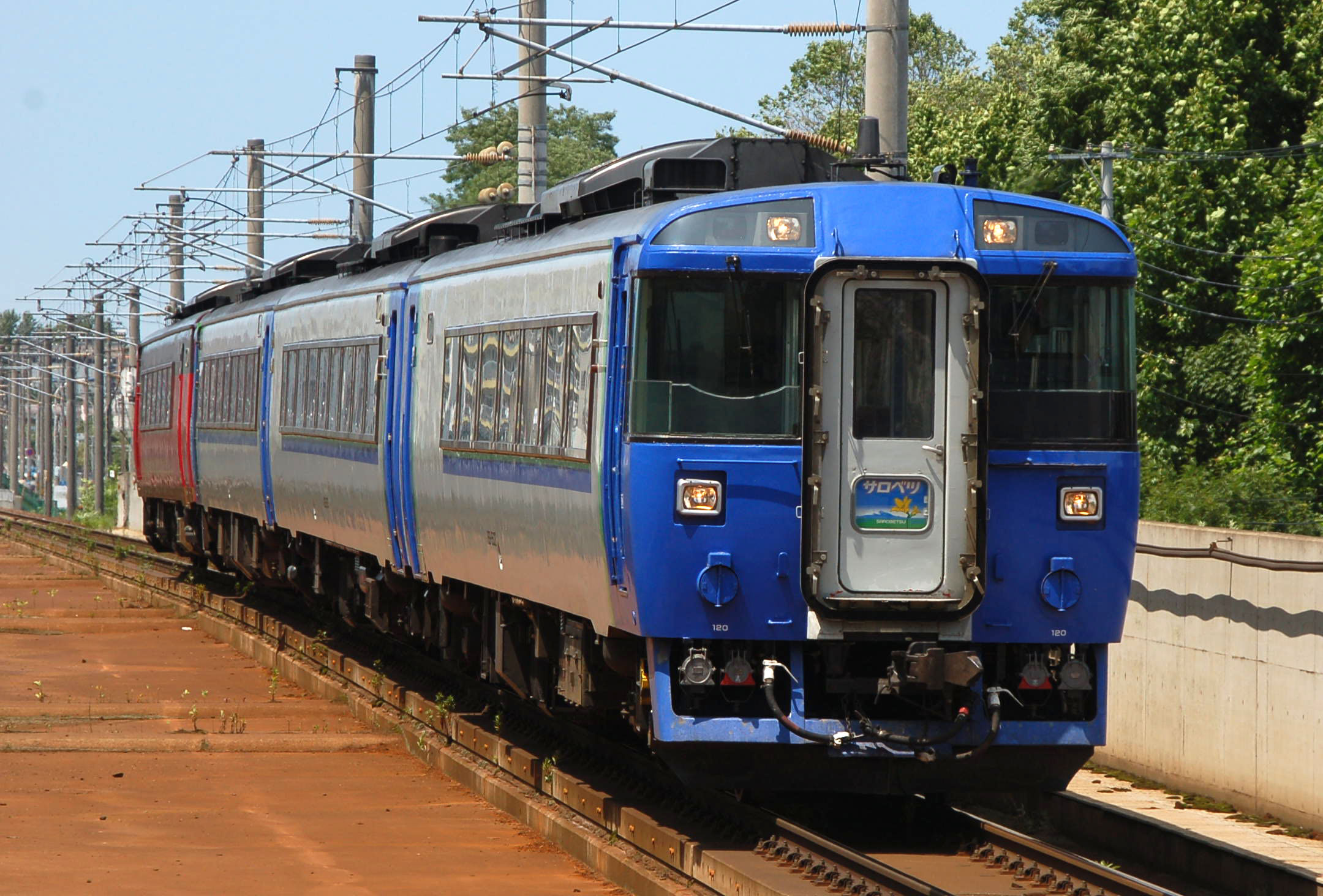 JR Hokkaido Kiha183 series Diesel multiple units, limited express "Sarobetsu". JR北海道キハ183系気動車による特急「サロベツ」(送り込み回送列車)。琴似にて。